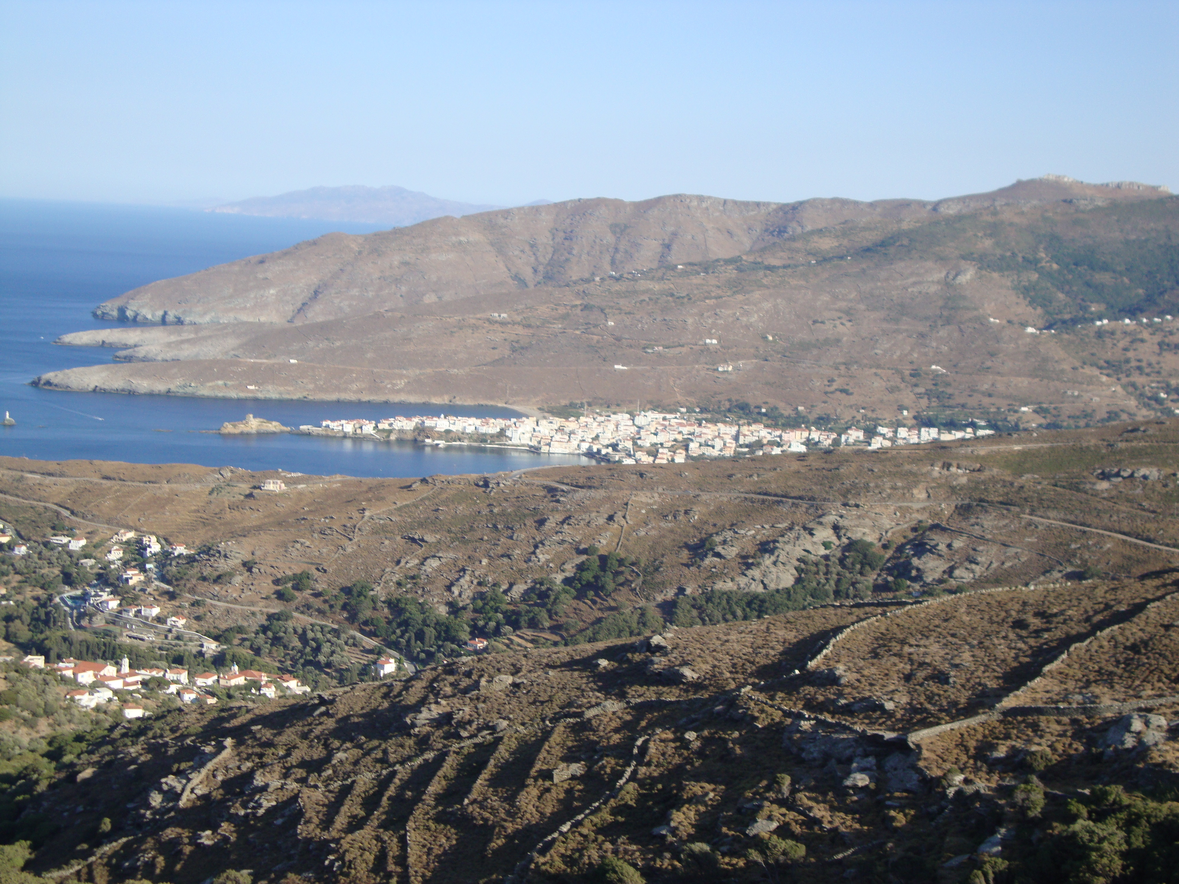 Πανόραμα Χώρας, Άνδρου